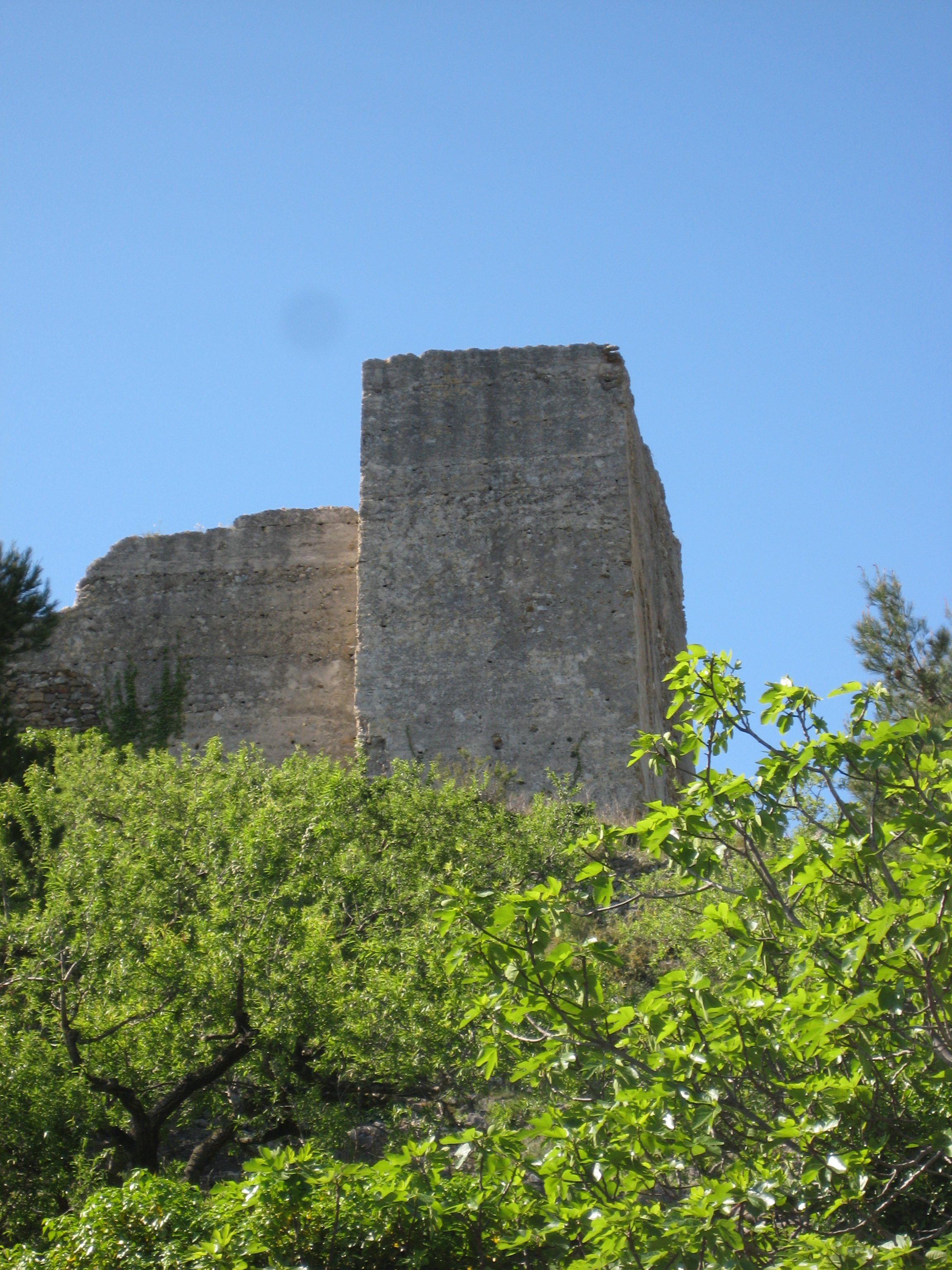 Torre NW del castell de Cervera del Maestrat (Baix Maestrat)